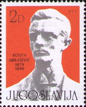 Kosta Abrašević